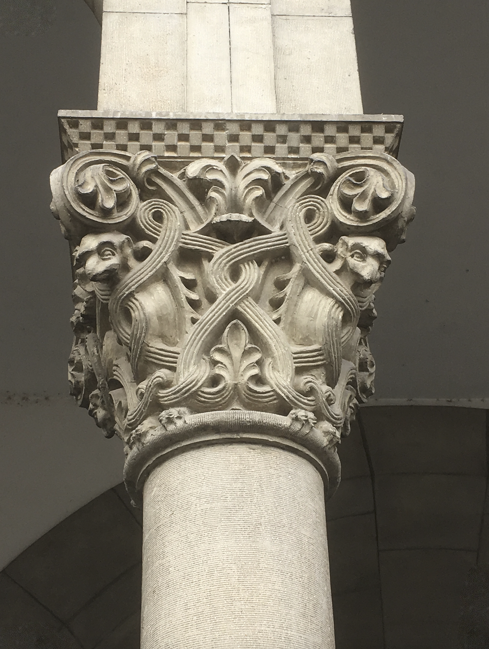 Iglesia de San Andrés